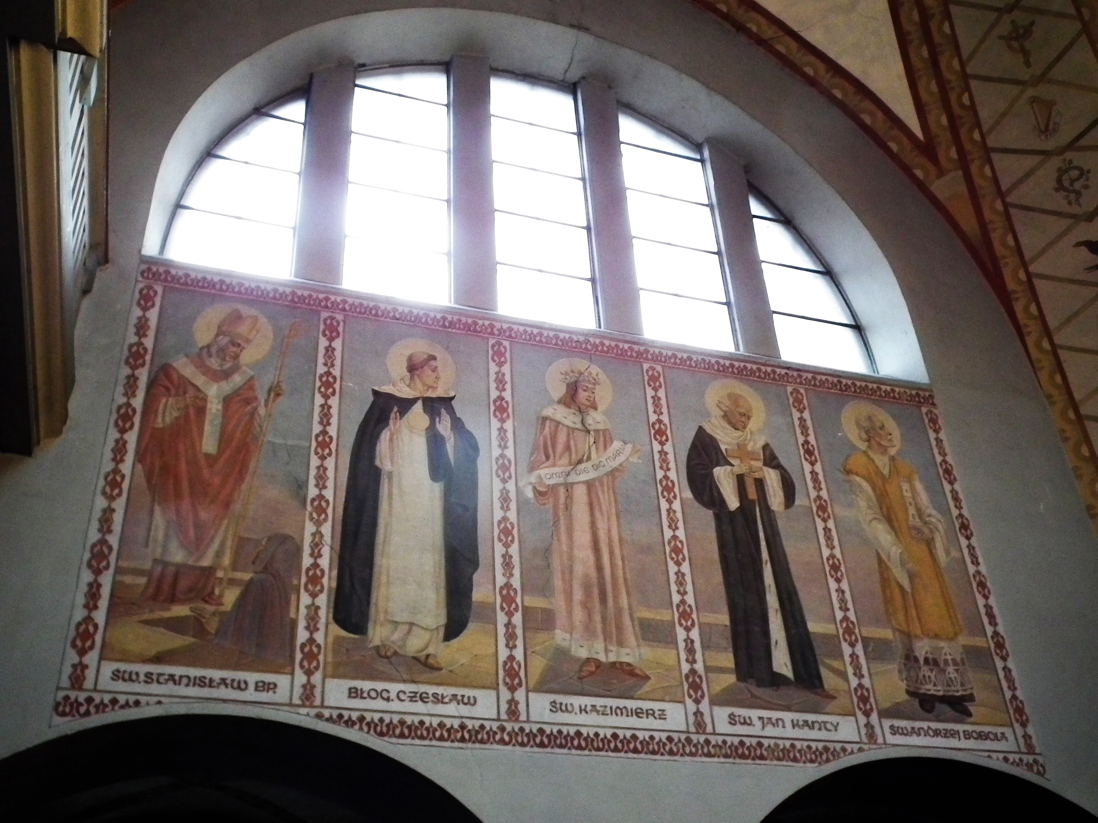 Kościół Świętej Trójcy we wsi Sikórz.